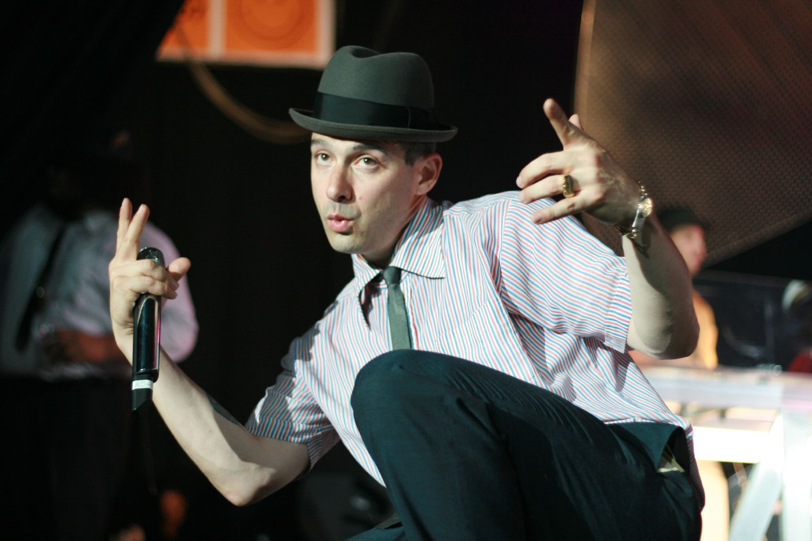 Actuació de Beastie Boys al Sónar 2007.the Beastie Boys